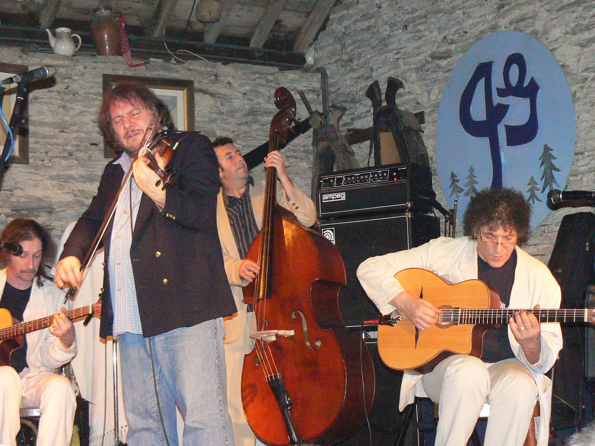 Le virtuose Yves Teicher (Belgique) et le Chorda Trio (France) à la Ferme de la Madelonne à Gouvy (Belgique) le 20 janvier 2007, dans le cadre des Djangofolllies.